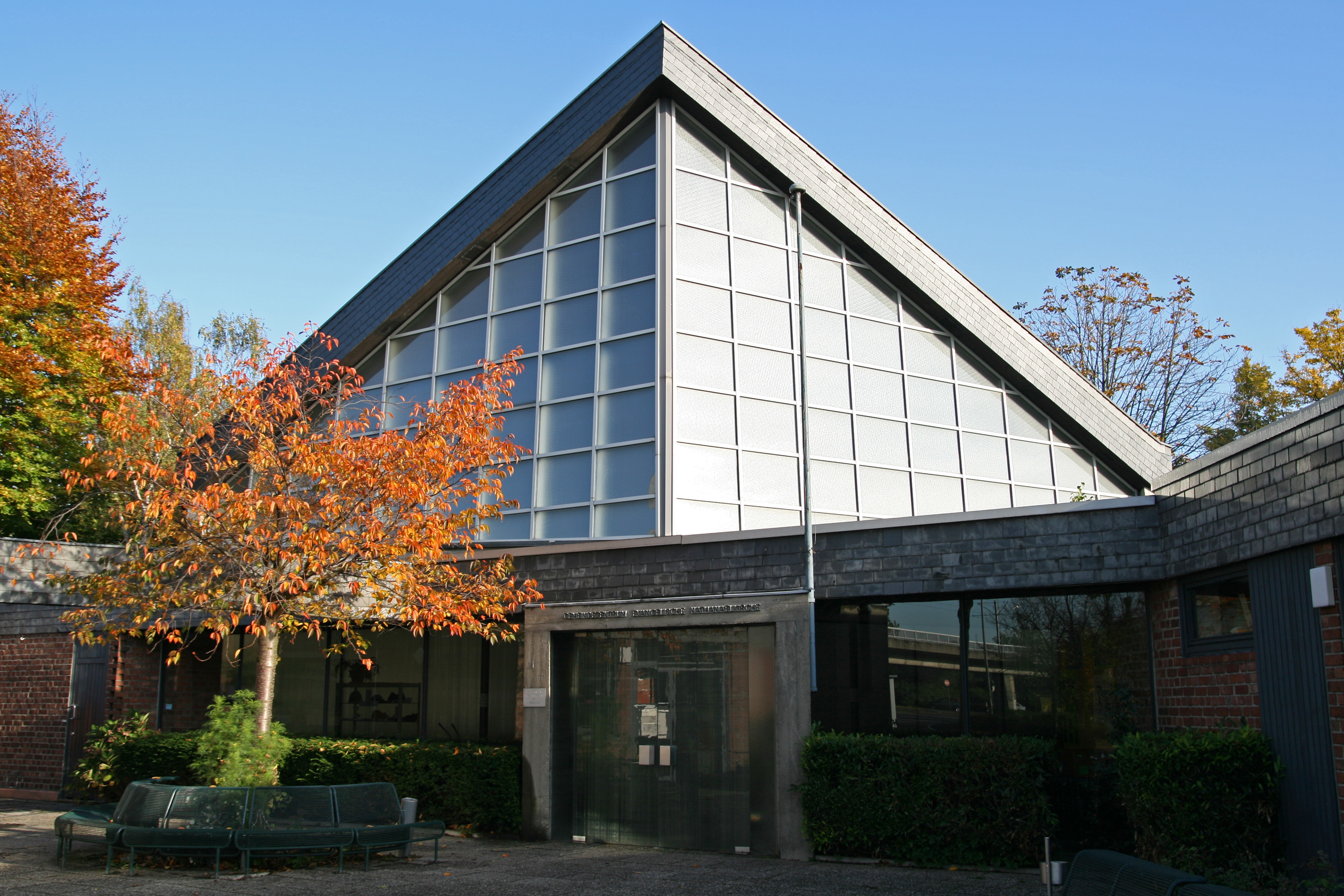 Nathanaelkirche in Köln